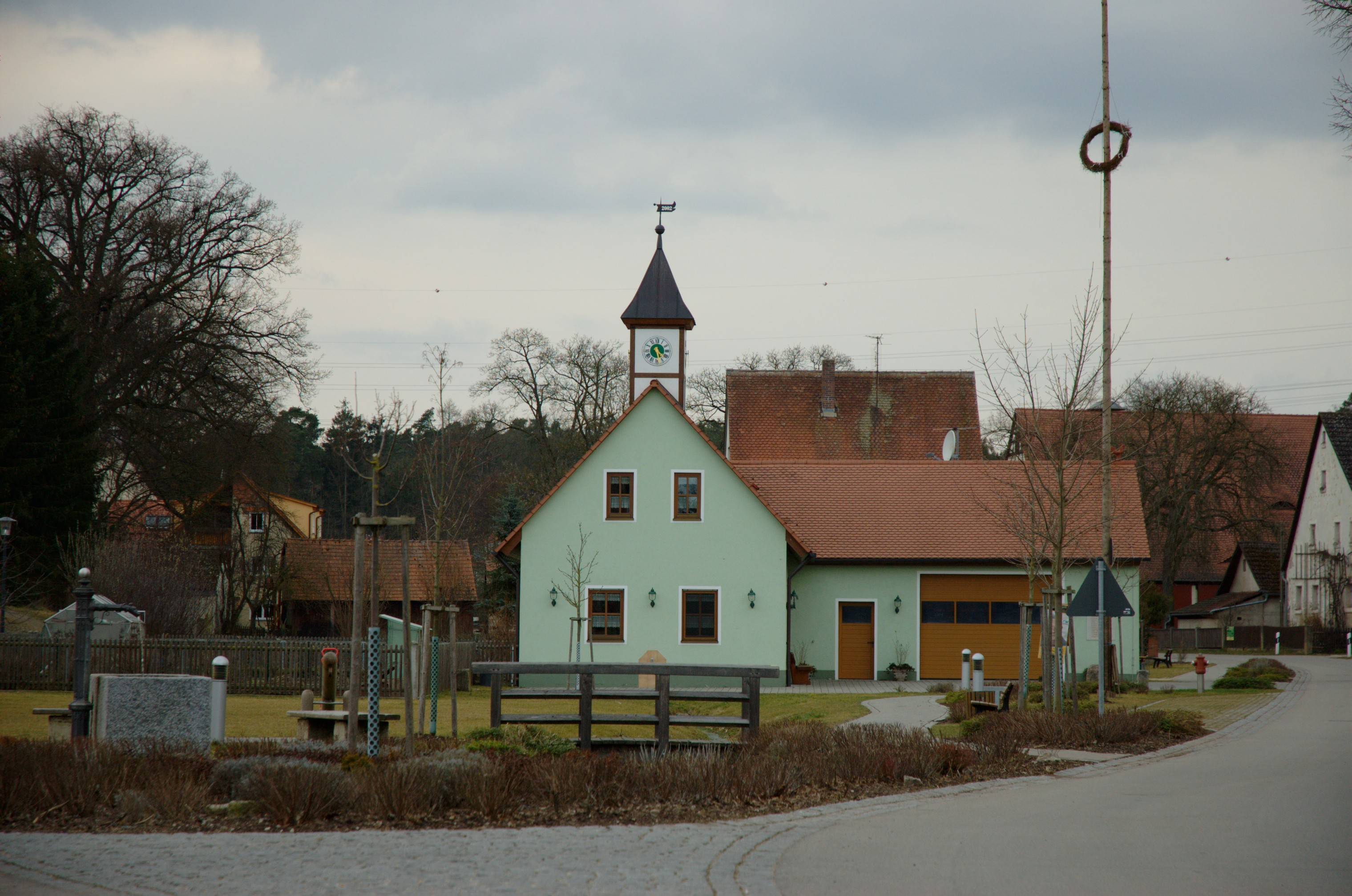 Müncherlbach